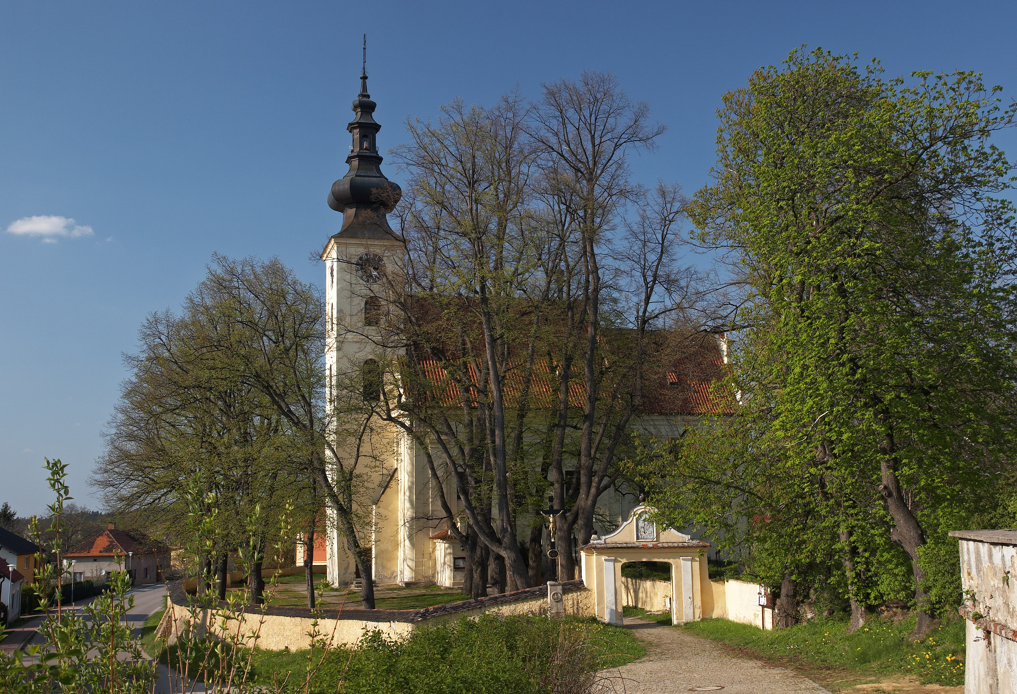 Kostel Všech svatých v Kamenném Újezdě.